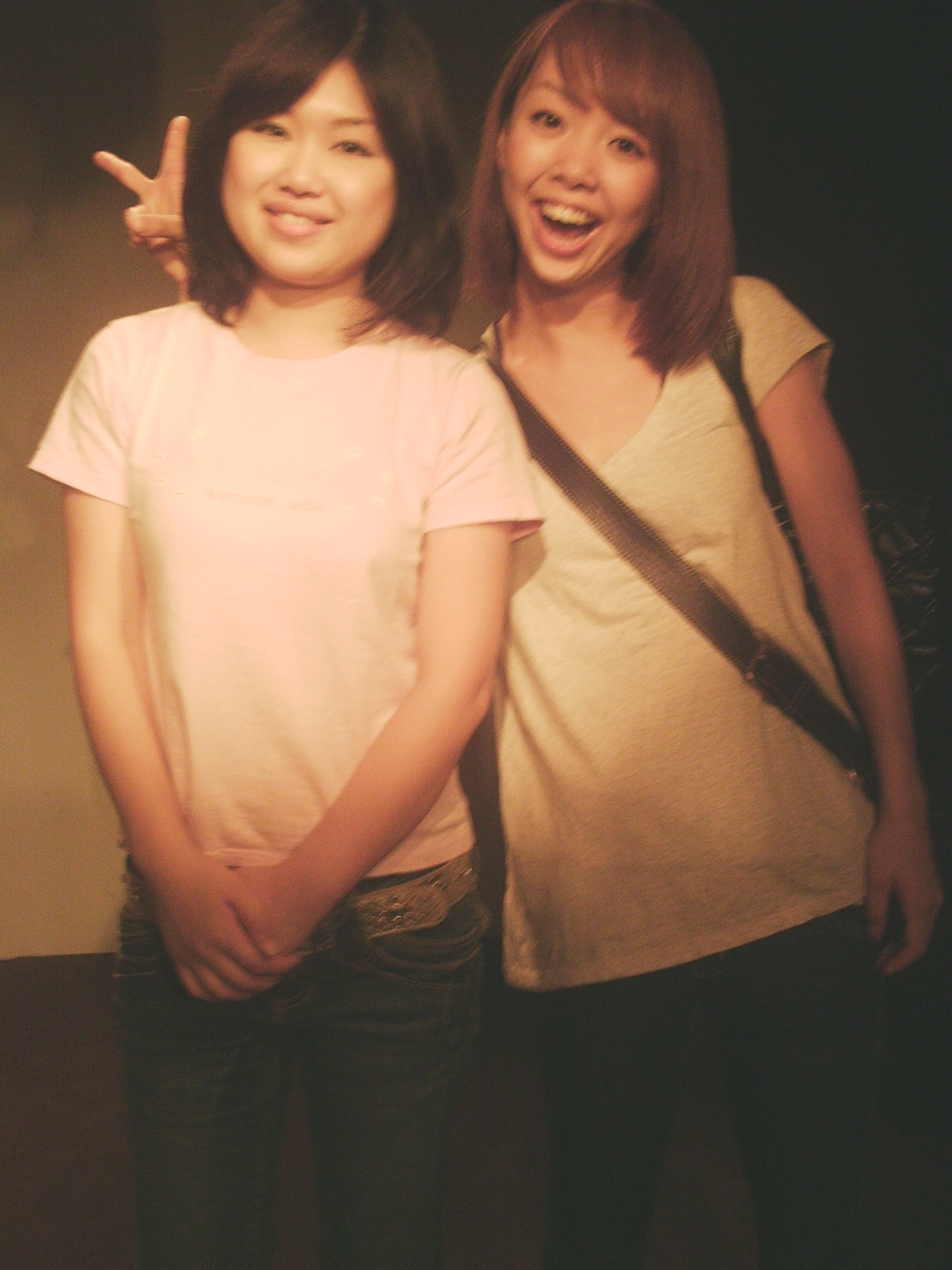 パルフェ (お笑いコンビ 2009年9月)